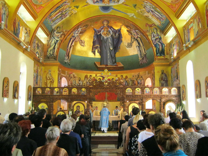 Католичка црква Успение на Пресвета Богородица - Струмица